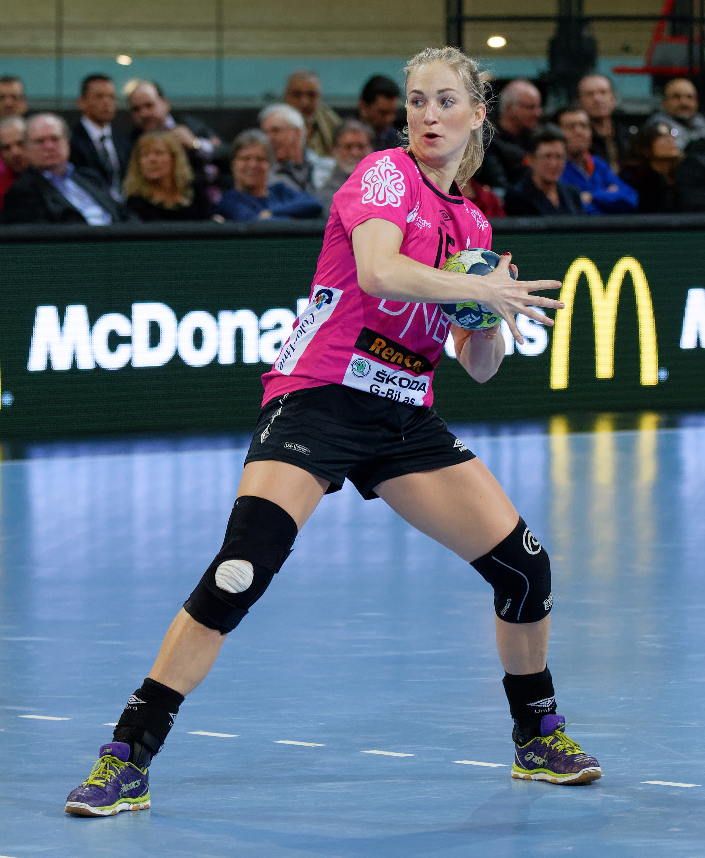 Rencontre du tour principal de coupe EHF entre Issy Paris Hand et les norvégiennes de Vipers Kristiansand au vélodrome de Saint-Quentin en Yvelines, le 03 février 2018.